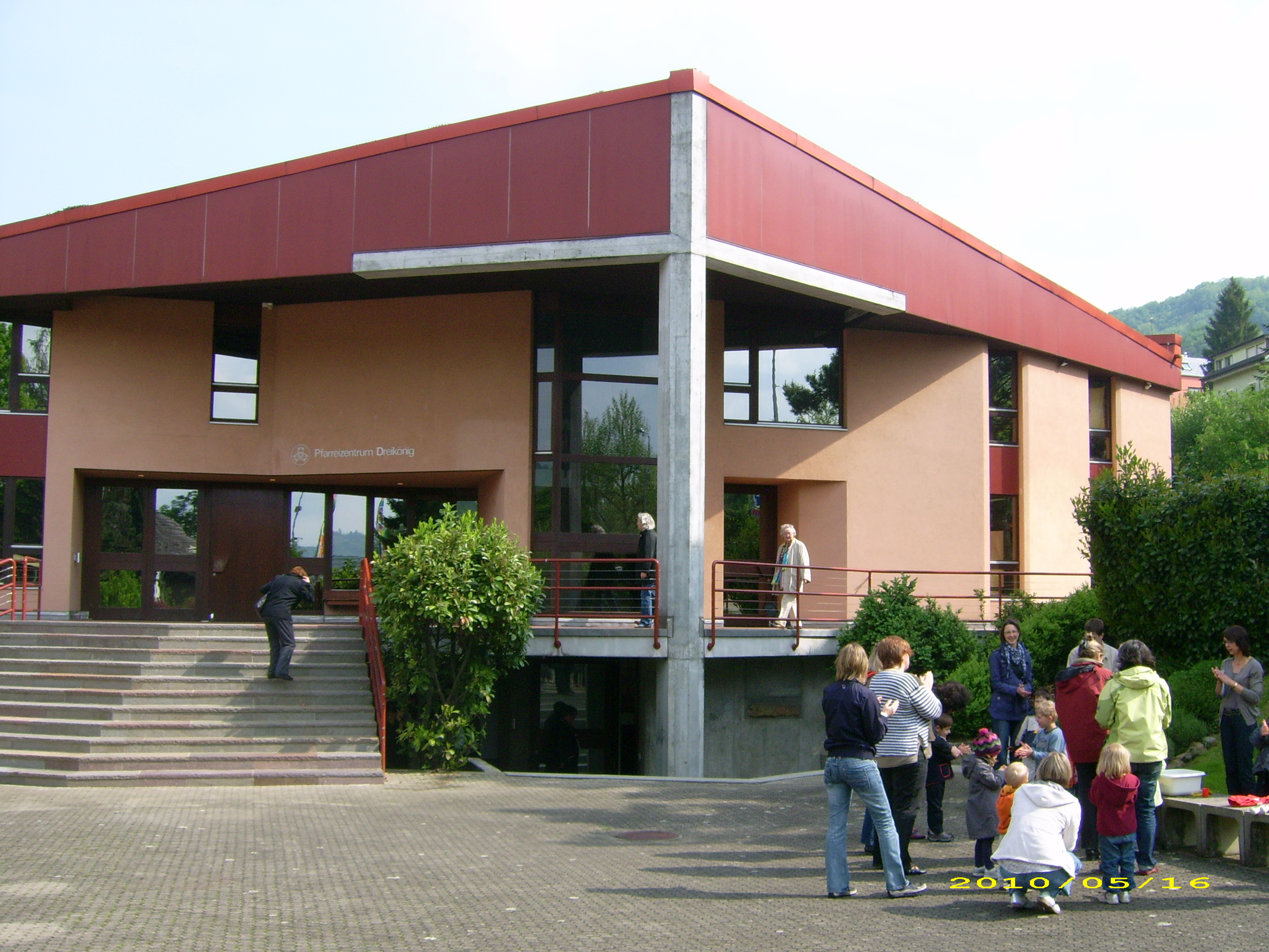 Pfarreizentrum Dreikönig